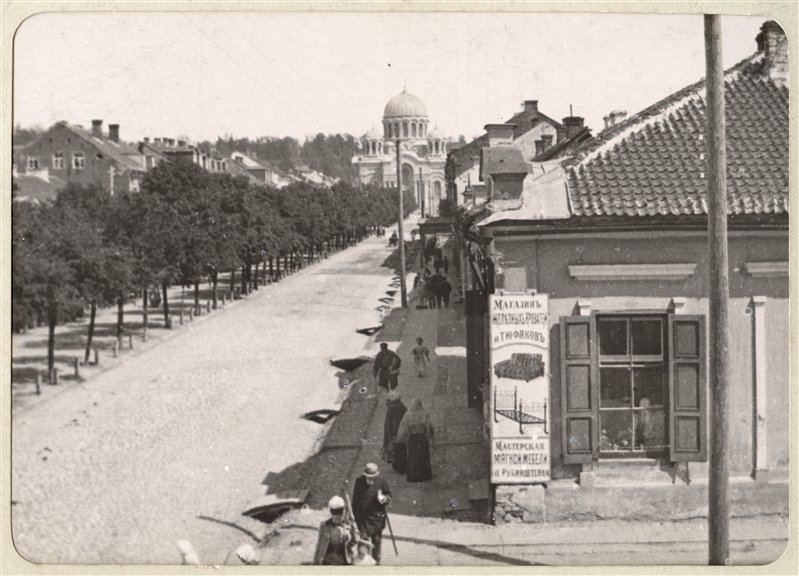 Kaunas, Laivės alėja, buvęs Nikolajaus prospektas valdant carinei Rusijai